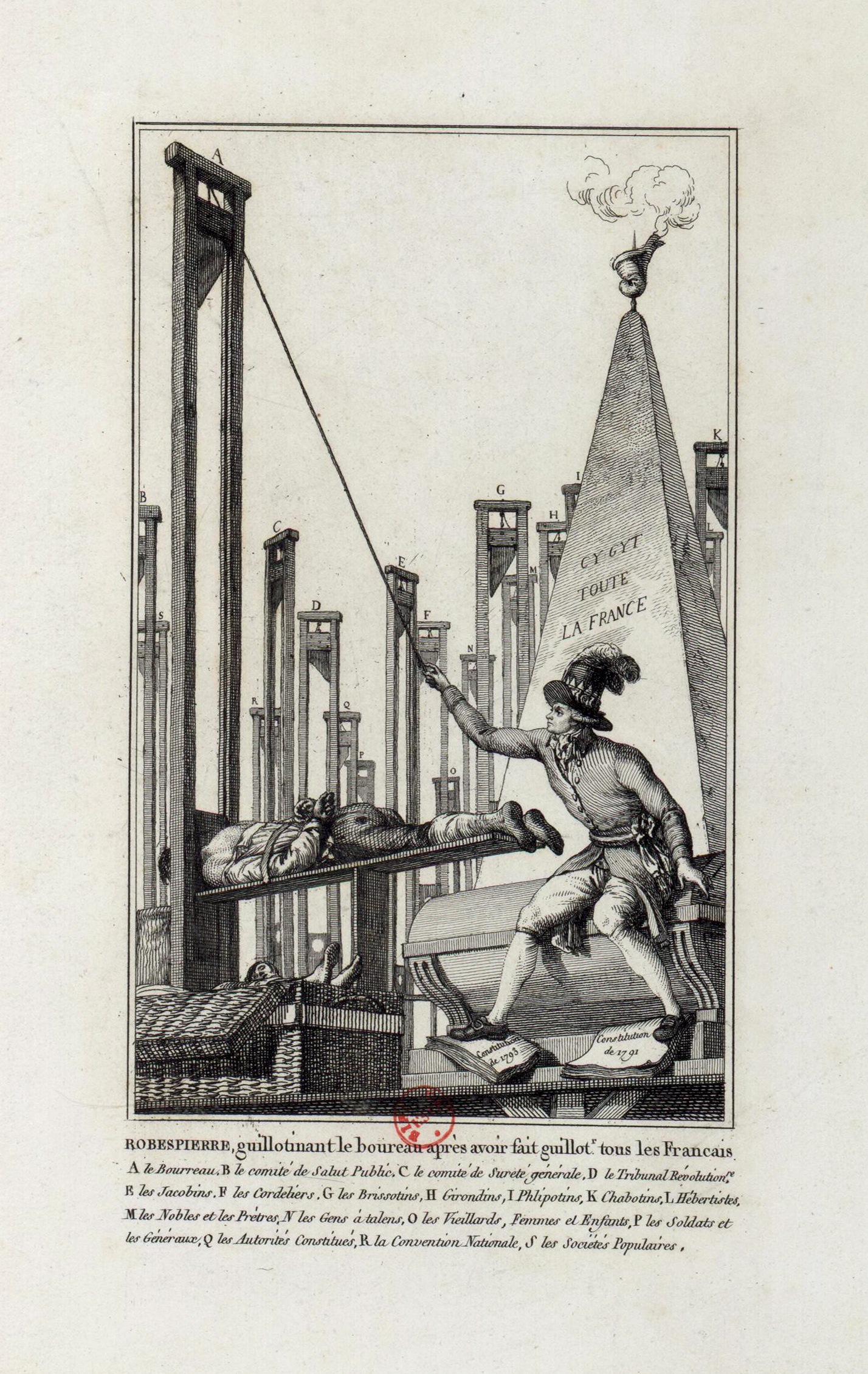 Estampe